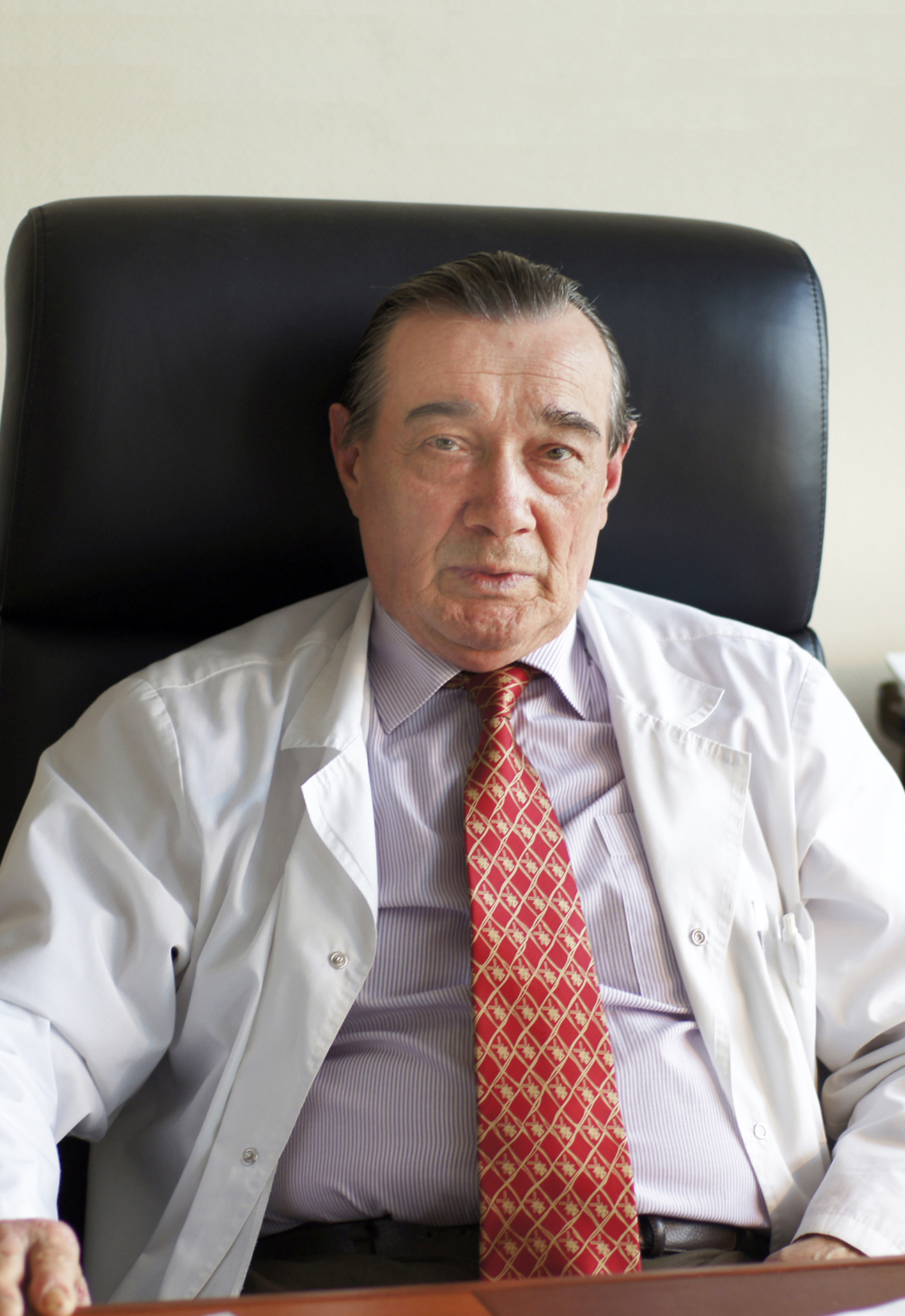 Доцент Любименко Вячеслав Андреевич - один из основателей службы анестезиологии и реанимации новорожденных в Ленинграде, главный внештатный детский неонатолог Комитета по здравоохранению Санкт-Петербурга